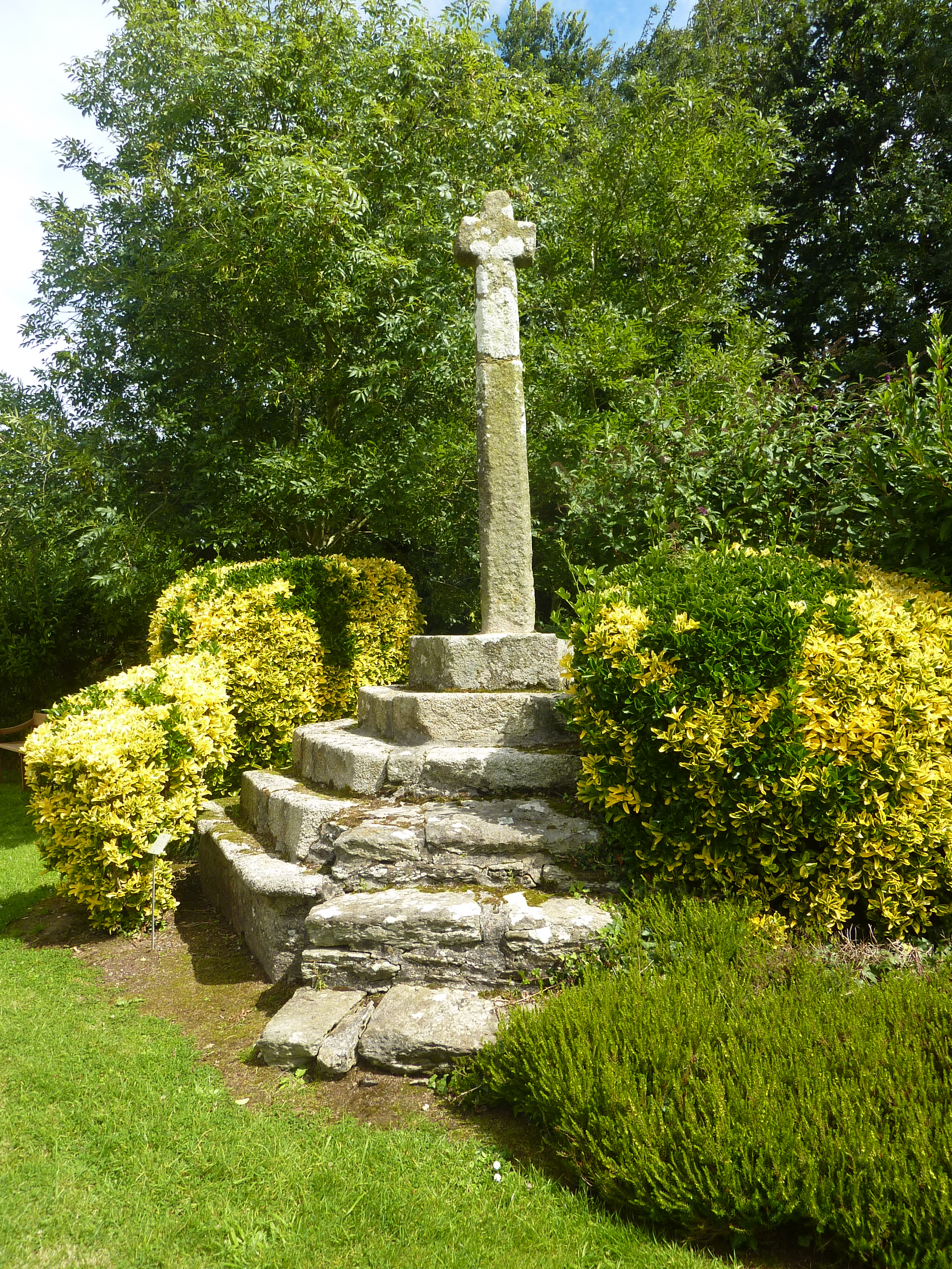 Le Folgoët : le calvaire près de la chapelle de Guicquelleau